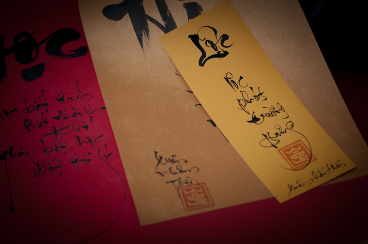 VanMieu_OngDo_NhamThin (1 of 13)